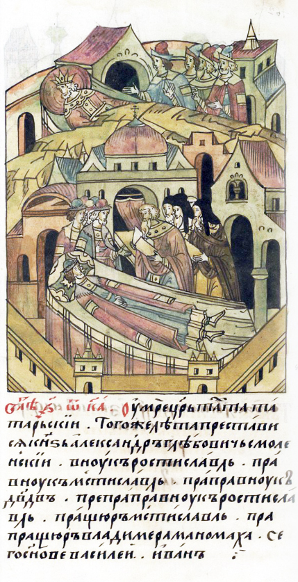 ЛИЦЕВОЙ ЛЕТОПИСНЫЙ СВОД В 6821 году. Умер царь Тахта татарский. В том же году преставился князь Александр Глебович Смоленский, внук Ростиславов, правнук Мстиславов, праправнук Давыдов, препраправнук Ростиславов, (потомок) пращура Мстислава, прапращура Владимира Манамаха. Его сыновья: Василий, Иван.